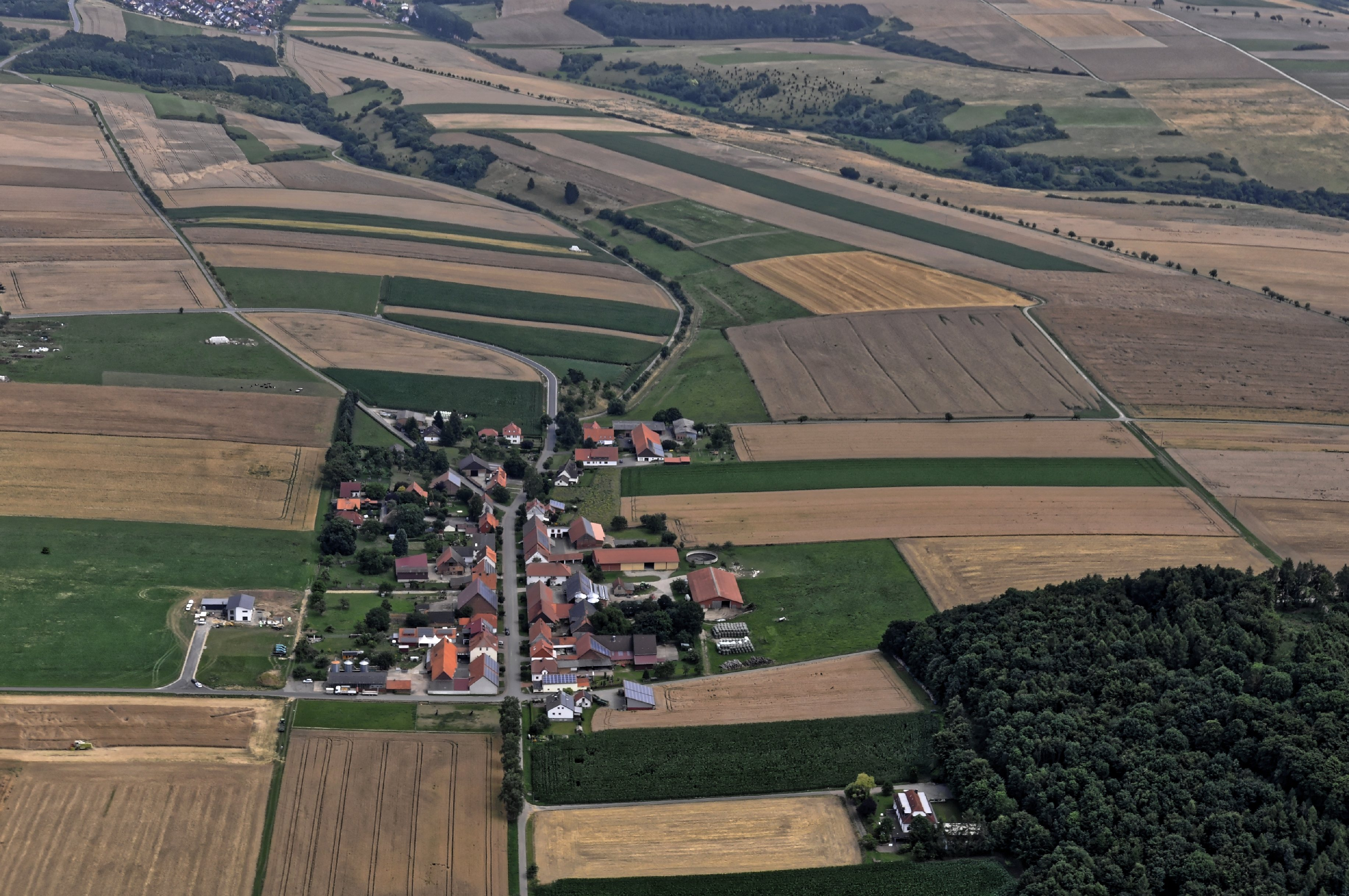 Bilder vom Flug Nordholz-Hammelburg 2015: Hofgeismar-Friedrichsdorf